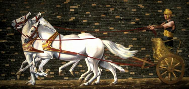 Тркач са сирмијумског хиподрома. Фотографија зидне слике.